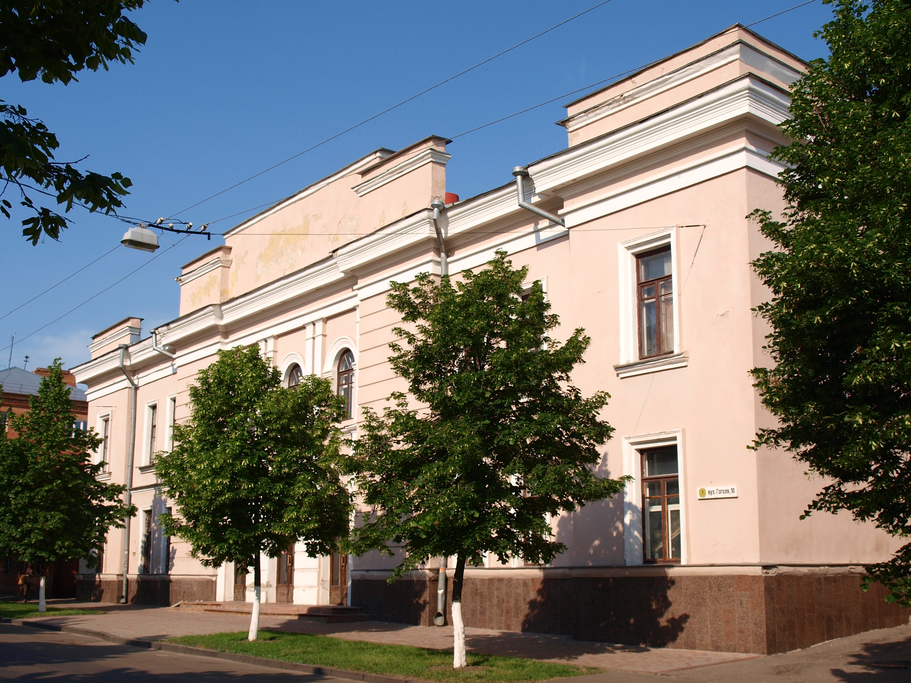 Здание Полтавской областной филармонии (бывшая Хоральная синагога)